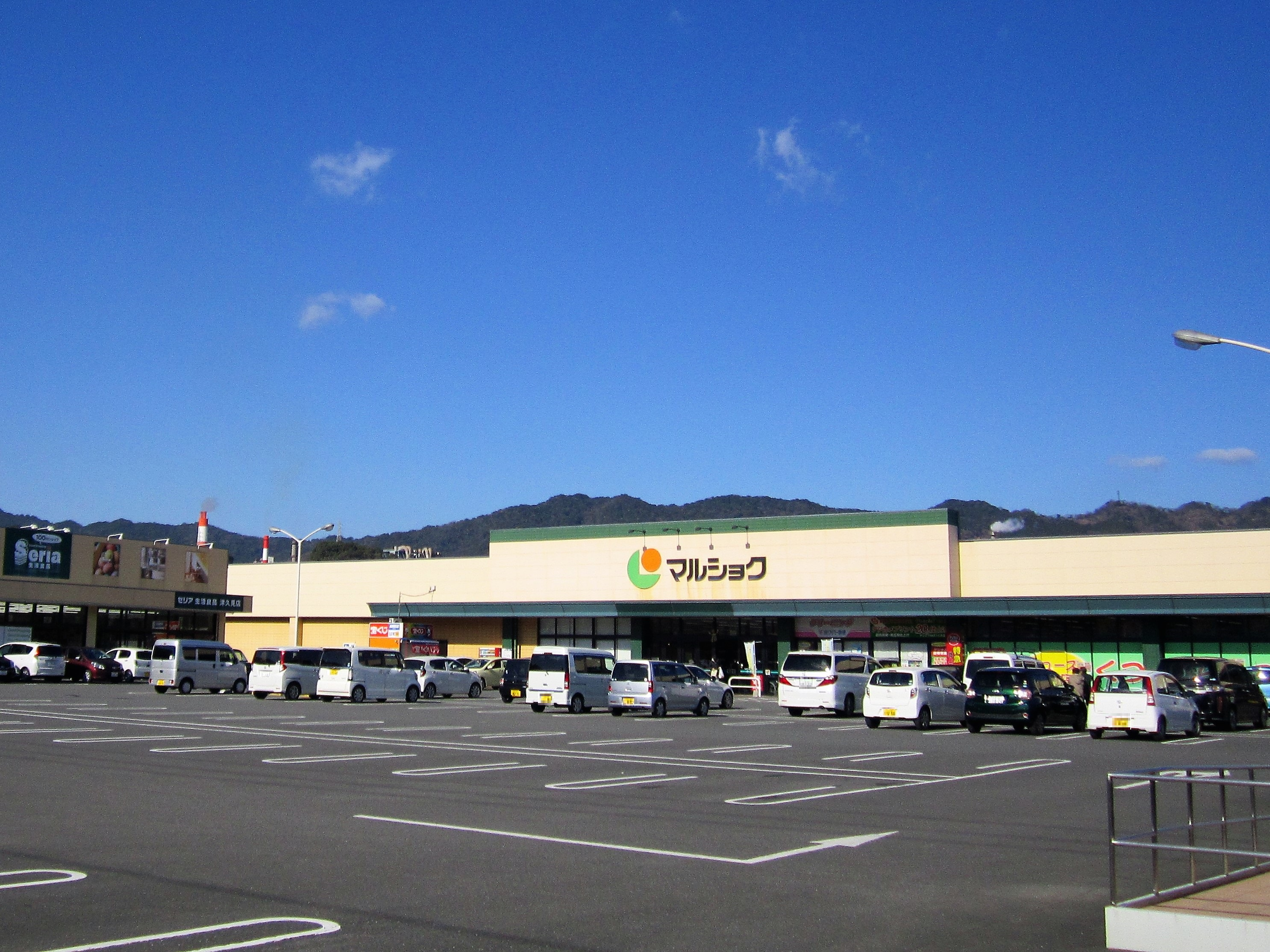 マルショク津久見店（津久見市中央町） Canon PowerShot A2200